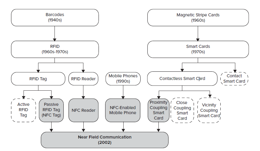 Монгол: NFC технологийн үүсэл хөгжил